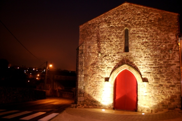 Français